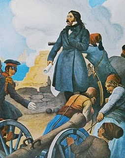 Ο Μαυροκορδάτος στα τείχη